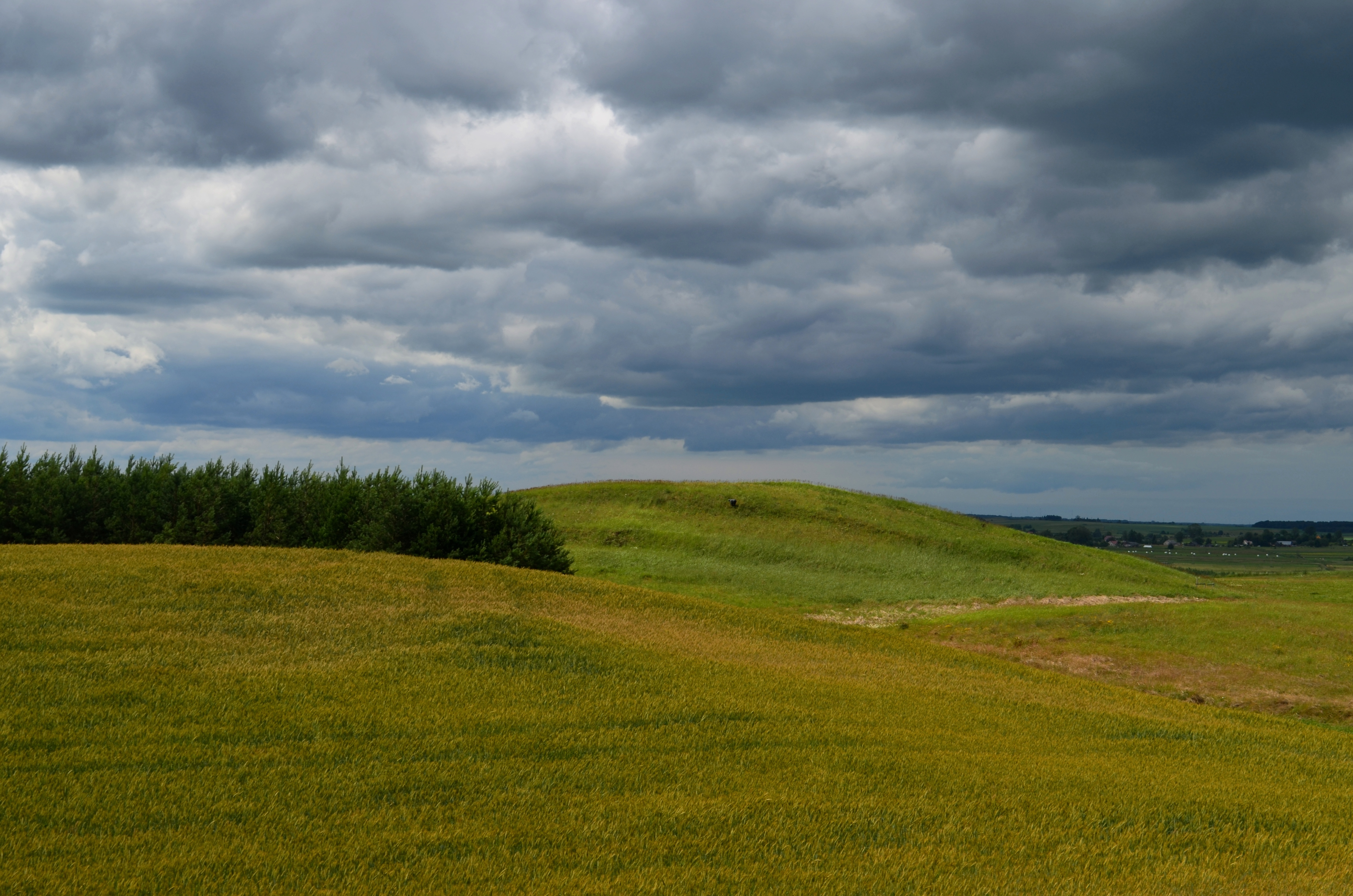 Papėčių piliakalnis (iš pietryčių), Alytaus raj.